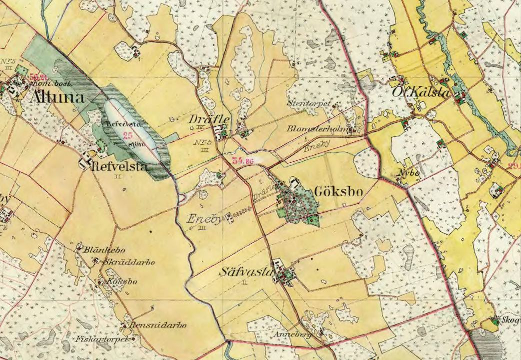 Gårdarna Revelsta, Gökbo m.fl. på Häradsekonomiska kartan